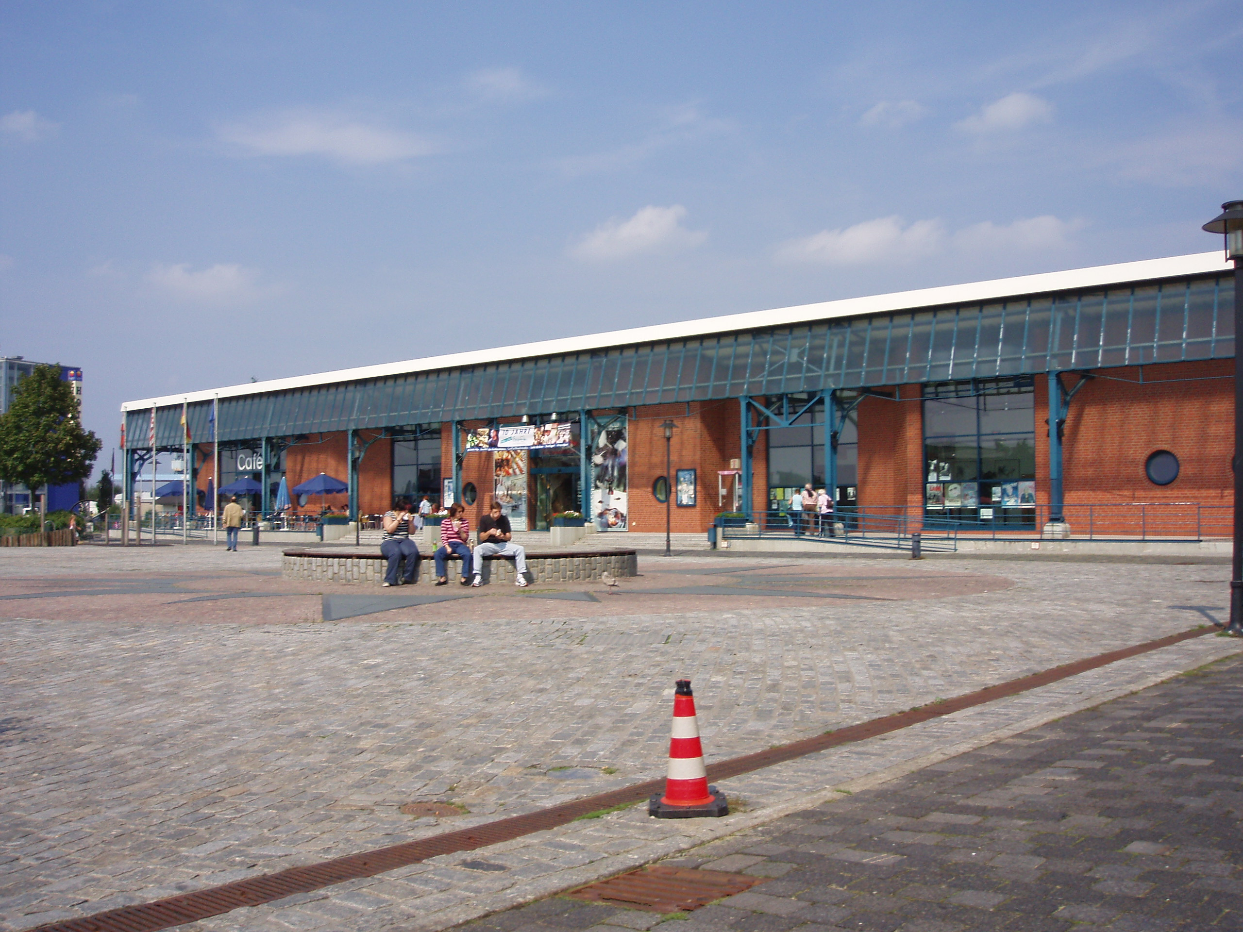 Das Atlanticum in Bremerhaven